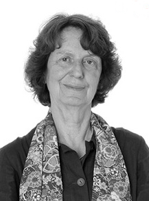 Catherine Larrère. Extrait de la série Infinités Plurielles@Marie-Hélène Le NY-2015.